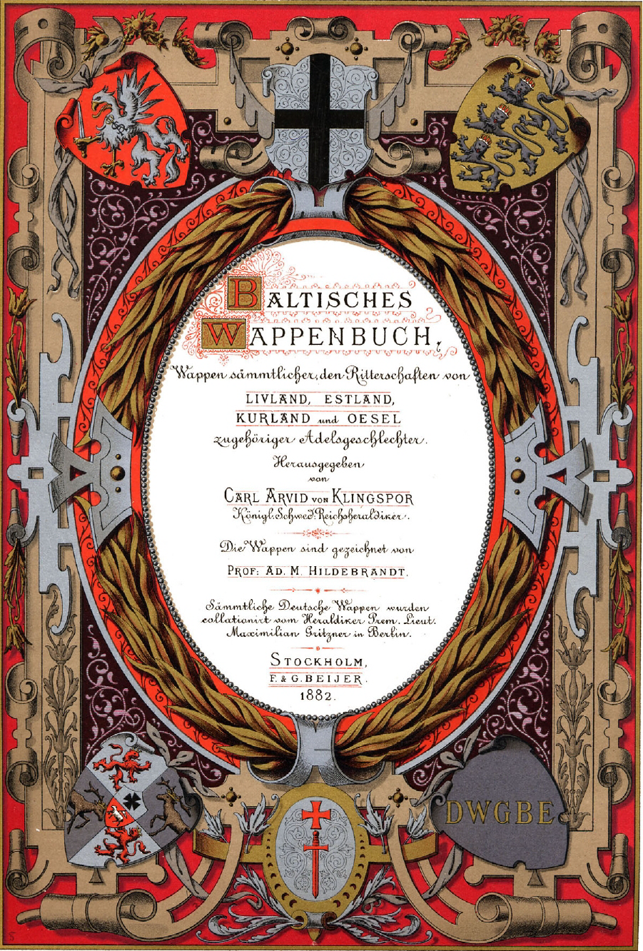 Балтійський гербовник. Титульна сторінка «Балтійського гербовника»